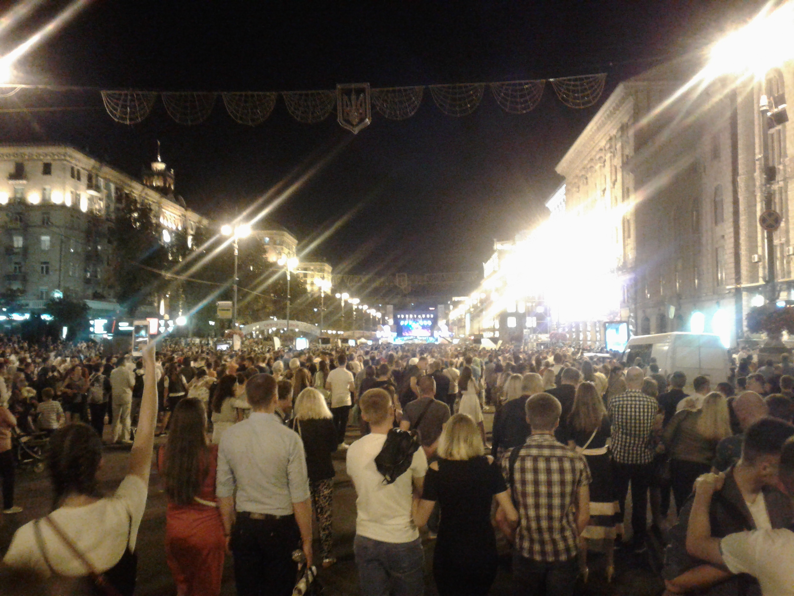 Під час виступу Ніка Вуйчіча. День подяки у Києві